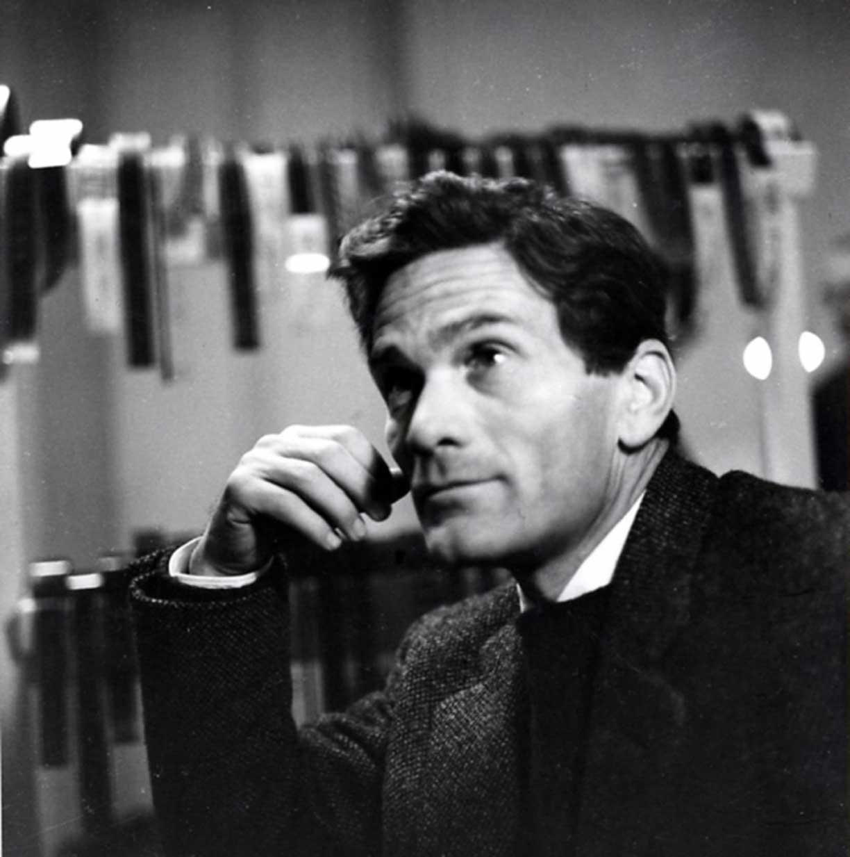 Foto di Pier Paolo Pasolini durante le riprese de "Il vangelo secondo Matteo"